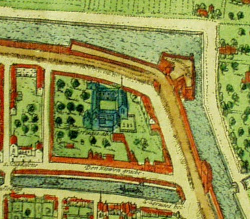 Uitsnede uit een stadsplattegrond van Braun uit omstreeks 1572 met daarop afgebeeld de Sint-Servaasabdij in Utrecht. Ook onder meer bolwerk Sonnenborgh is erop zichtbaar.